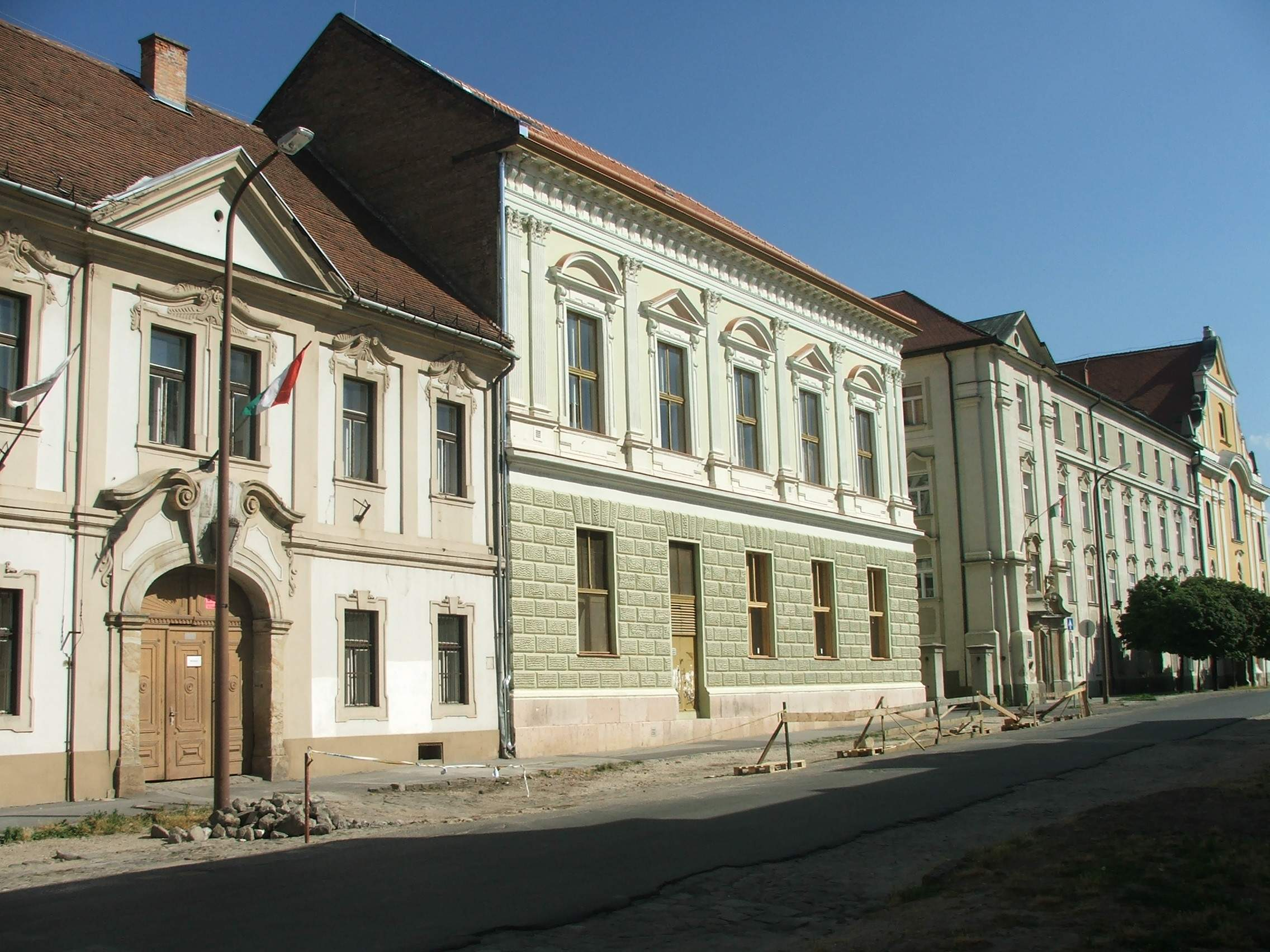 Bottyán street, Esztergom